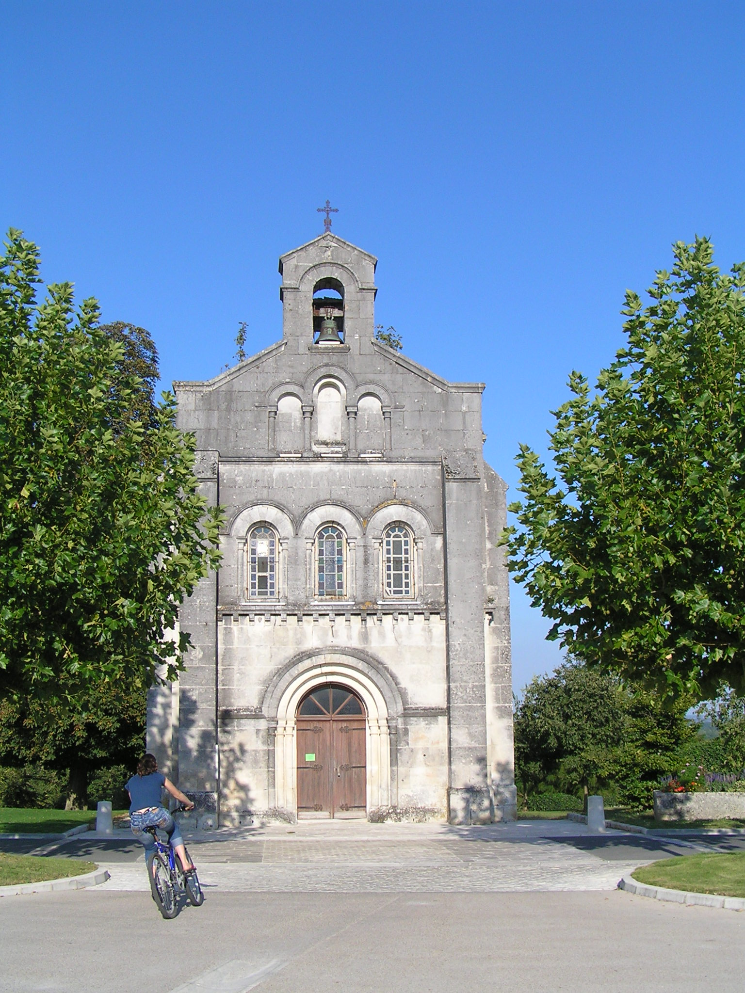 église de Boutiers (St-Antoine), Charente, France